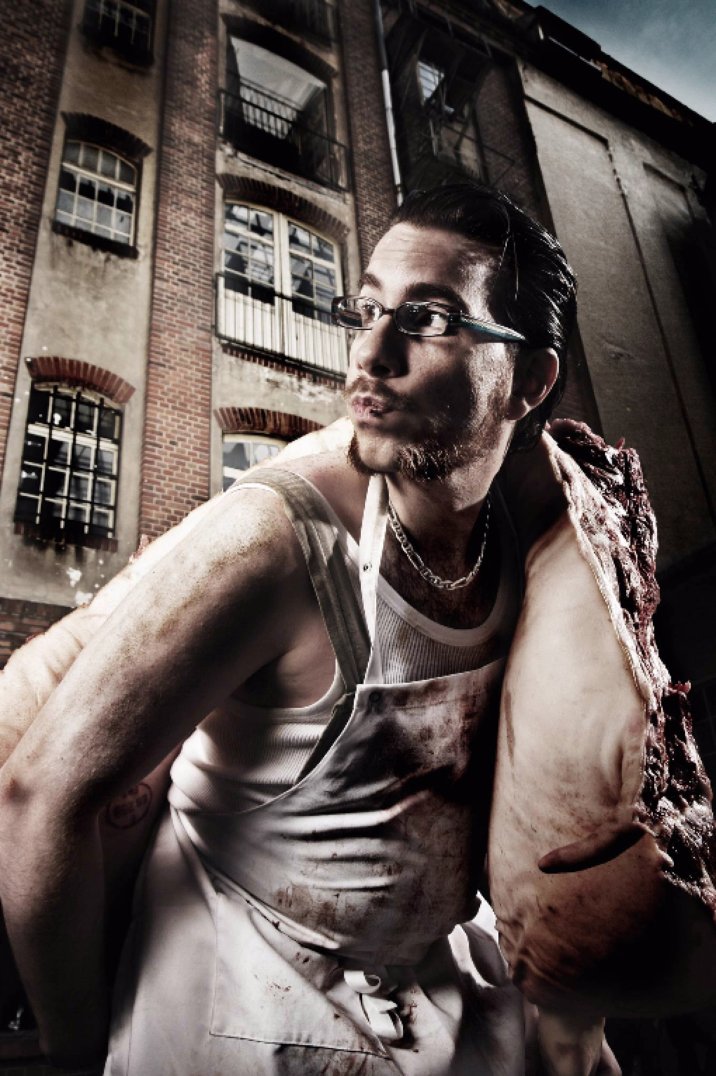 Kraans de Lutin, fotografiert von Matti Hillig